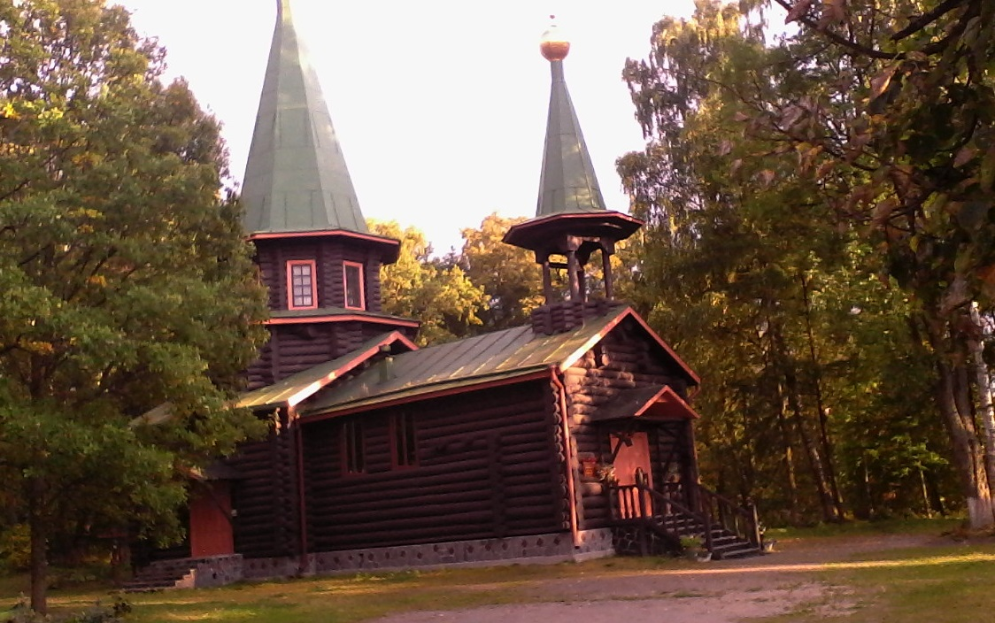 Главный вид